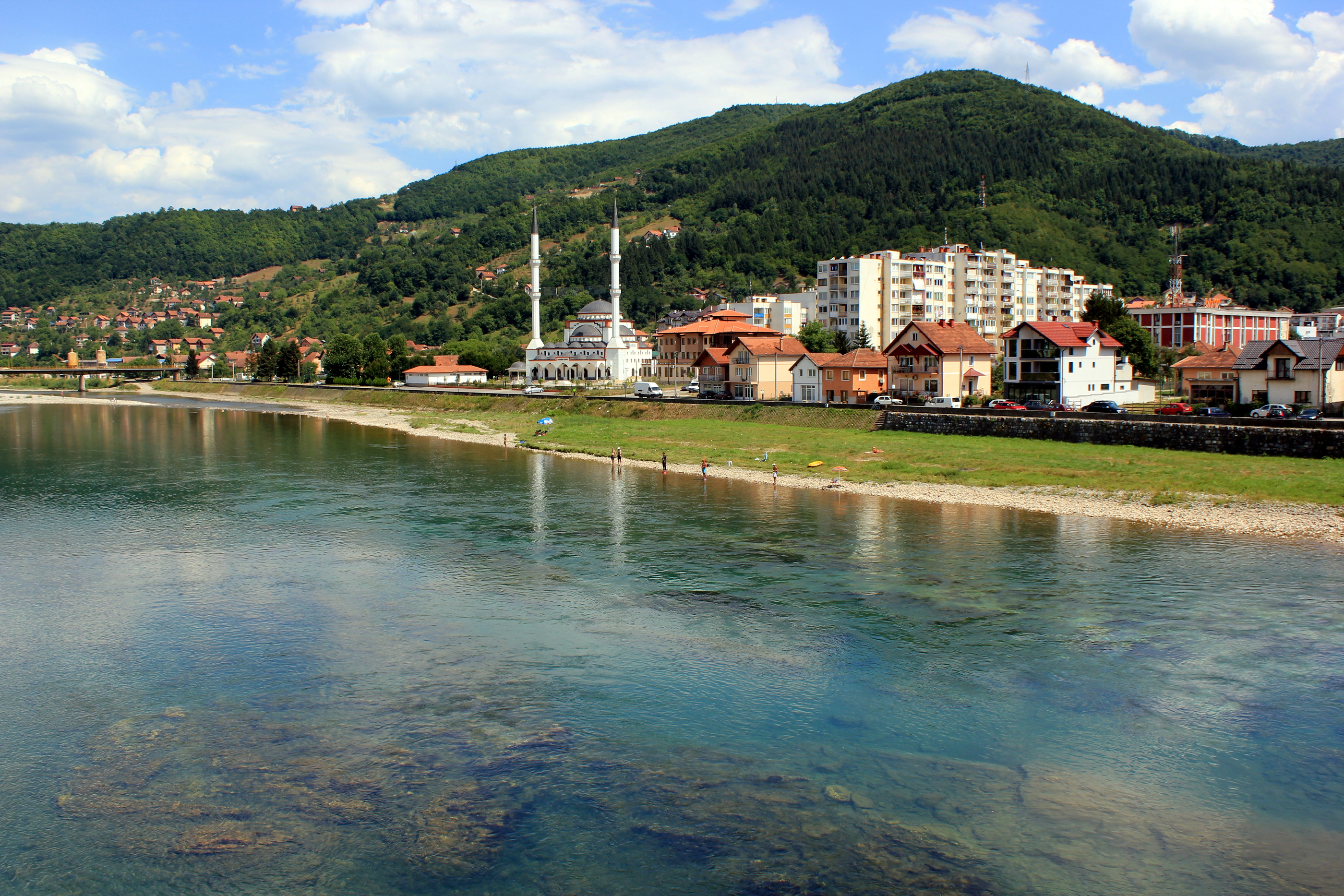 Die Drina in Goražde, Bosnien und Herzegowina.